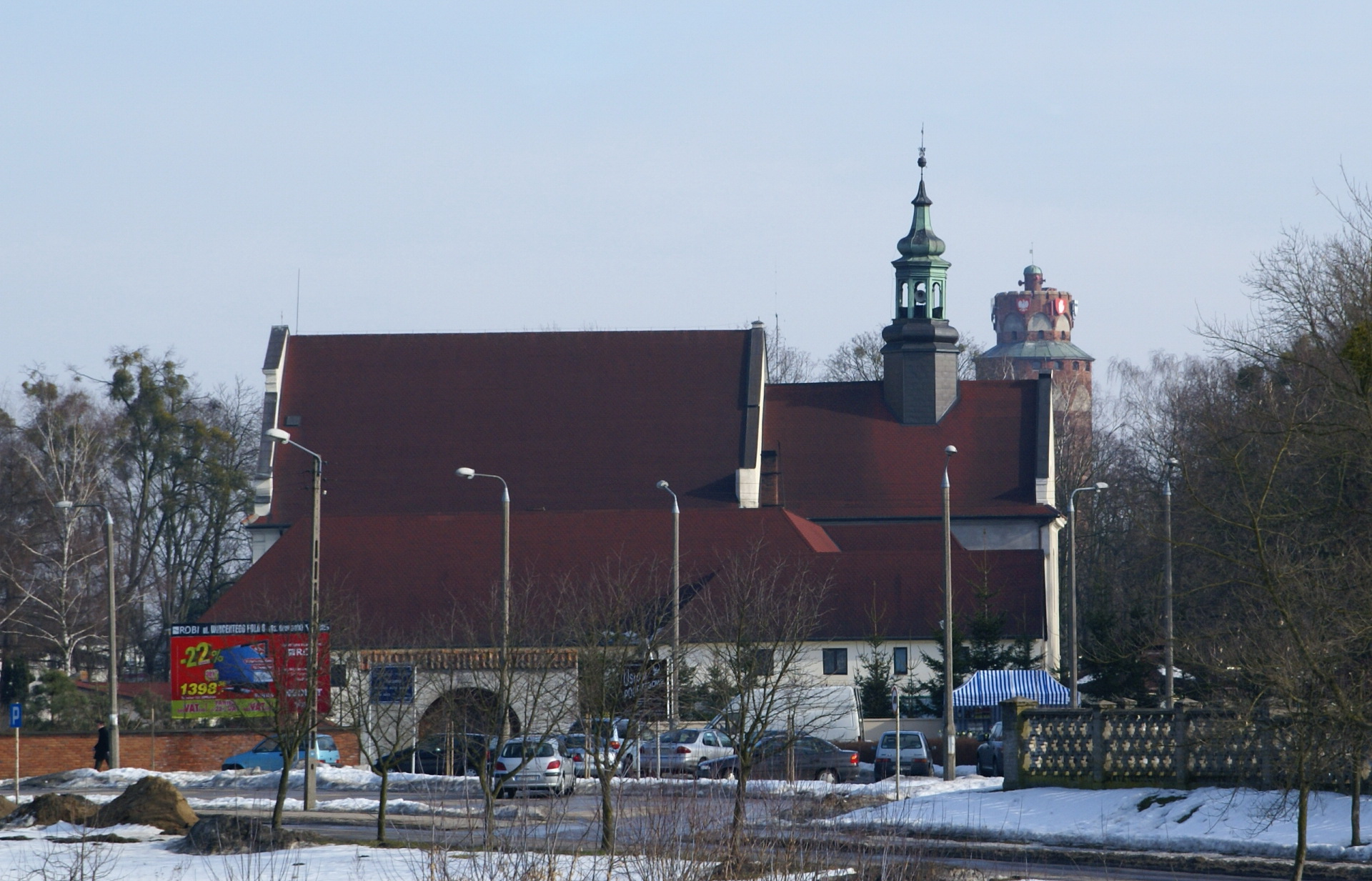 Brodnica - klasztor Franciszkanów, parafia pod wezwaniem Niepokalanego Poczęcia Najświętszej Maryi Panny; w tle wieża zamkowa (zabytek nr rejestr. A/126/45)